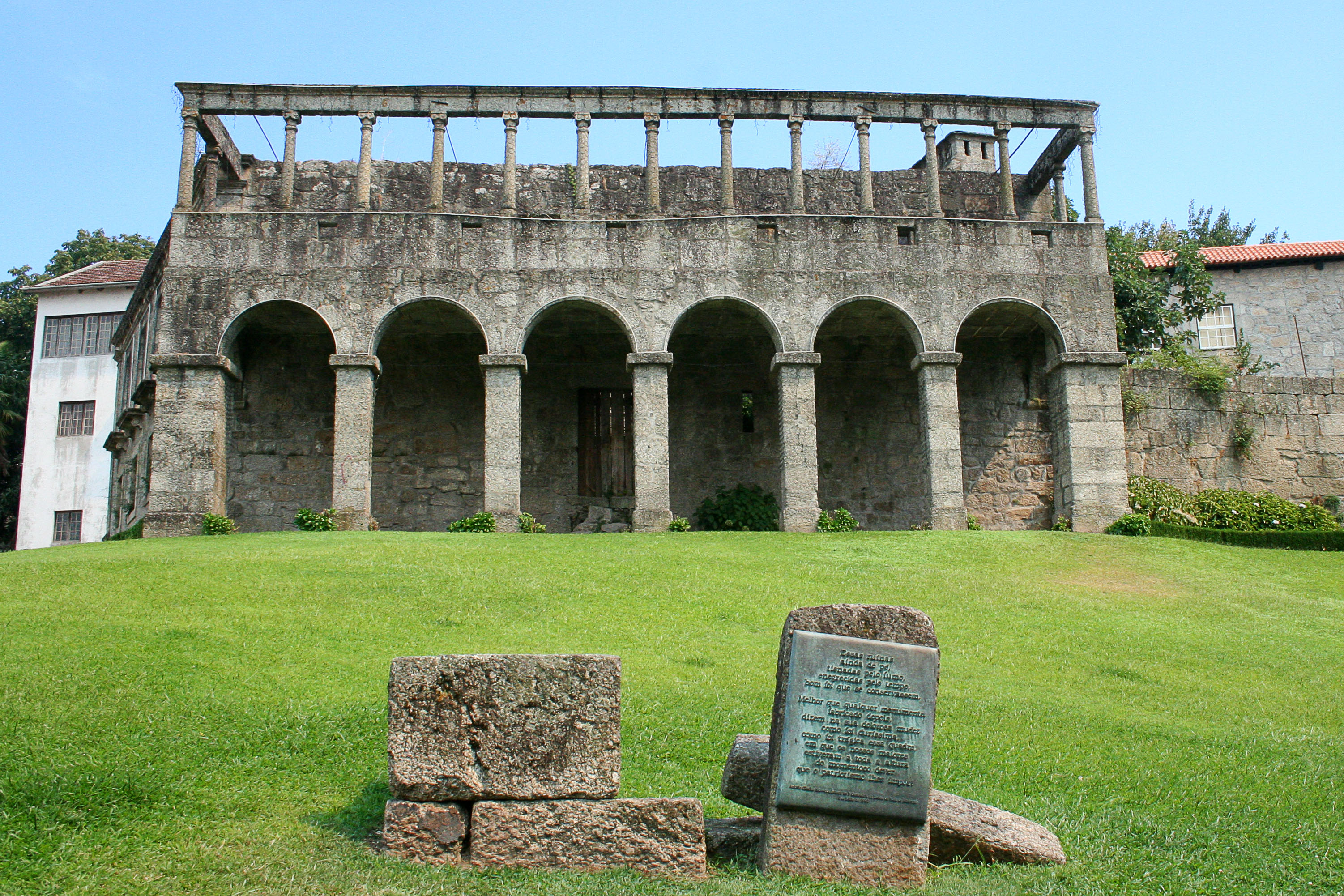 Edifício do Século XVIII, que pertencia à familia Magalhães em Amarante. Encontra-se em ruína desde 1809, quando foi incendiado pelas tropas francesas durante as 2ªs invasões francesas.